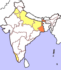 Lok Sabha 1996. Skapad av Soman.